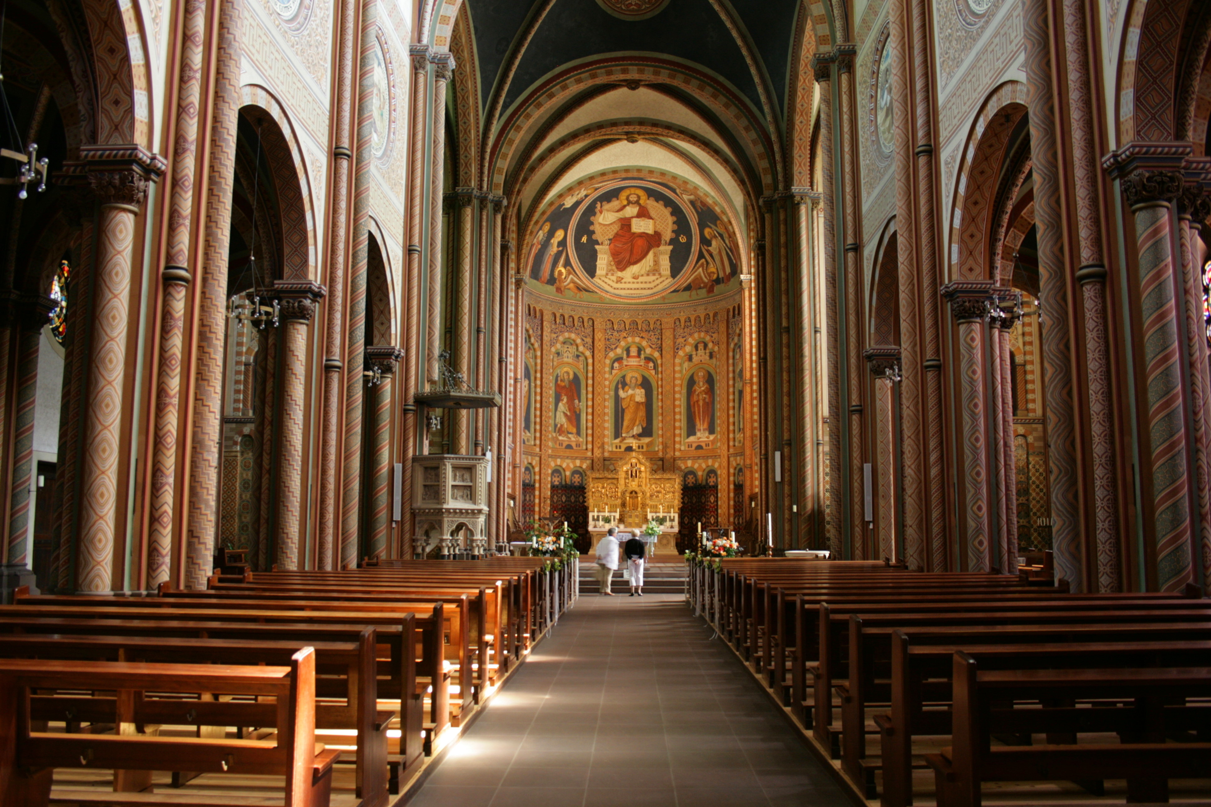 St. Pankratius in Anholt, Isselburg